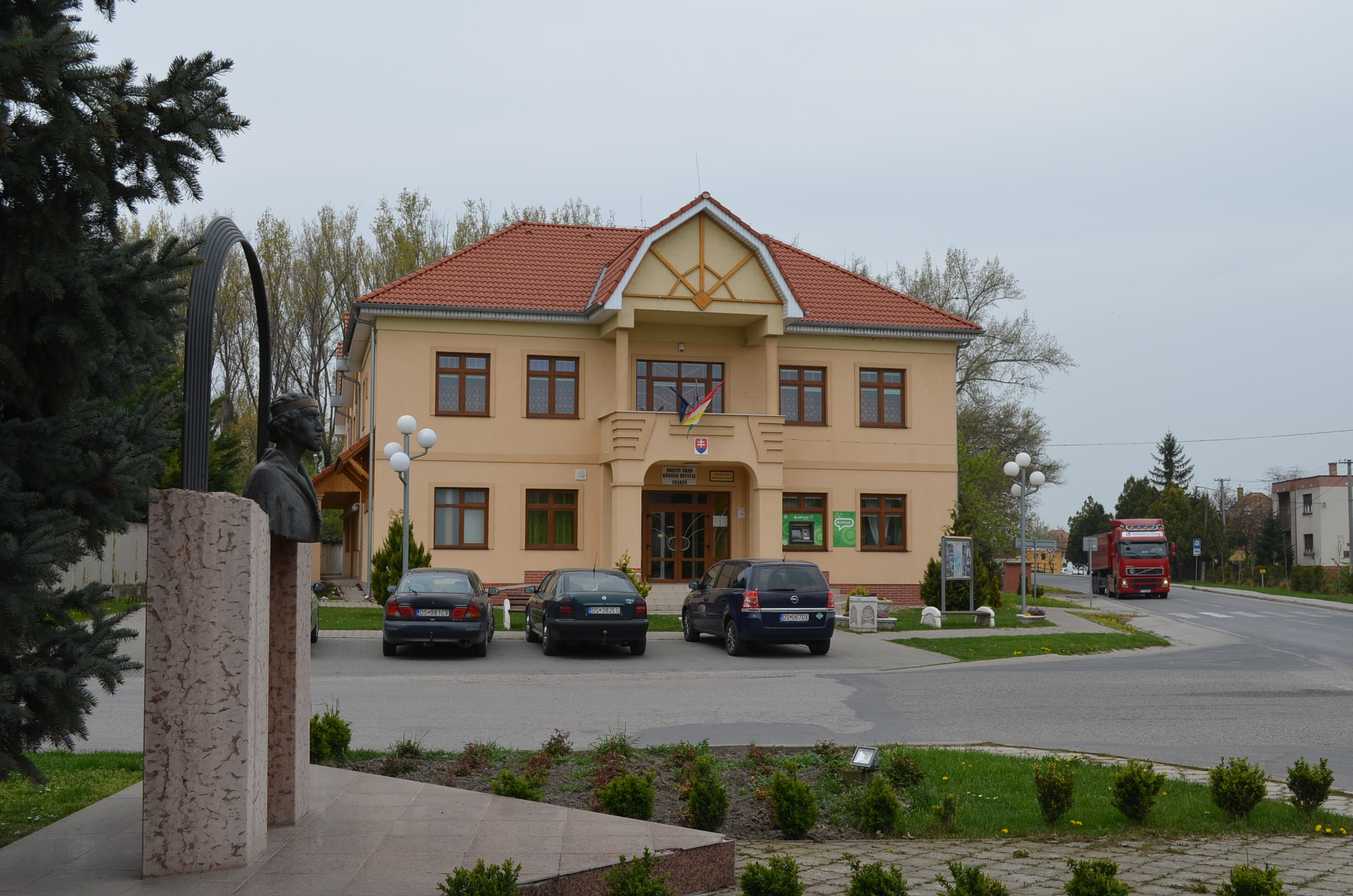 Nyékvárkony községháza